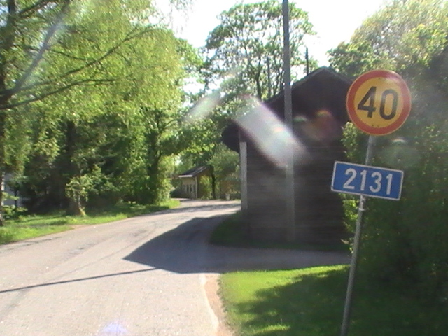 Yhdystie 2131 Köyliön Yttilässä.